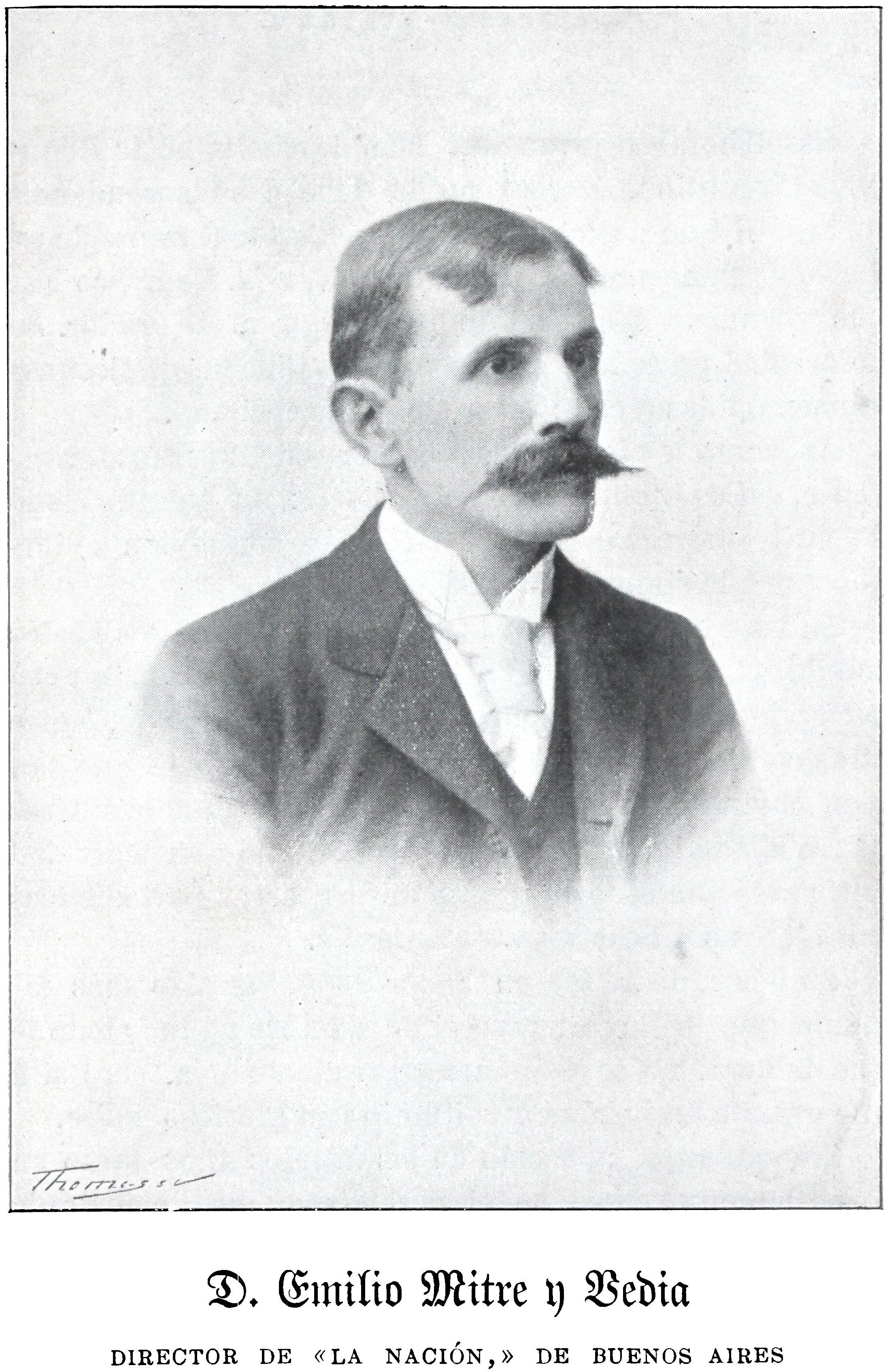 Almanaque Sud-Americano (1900)